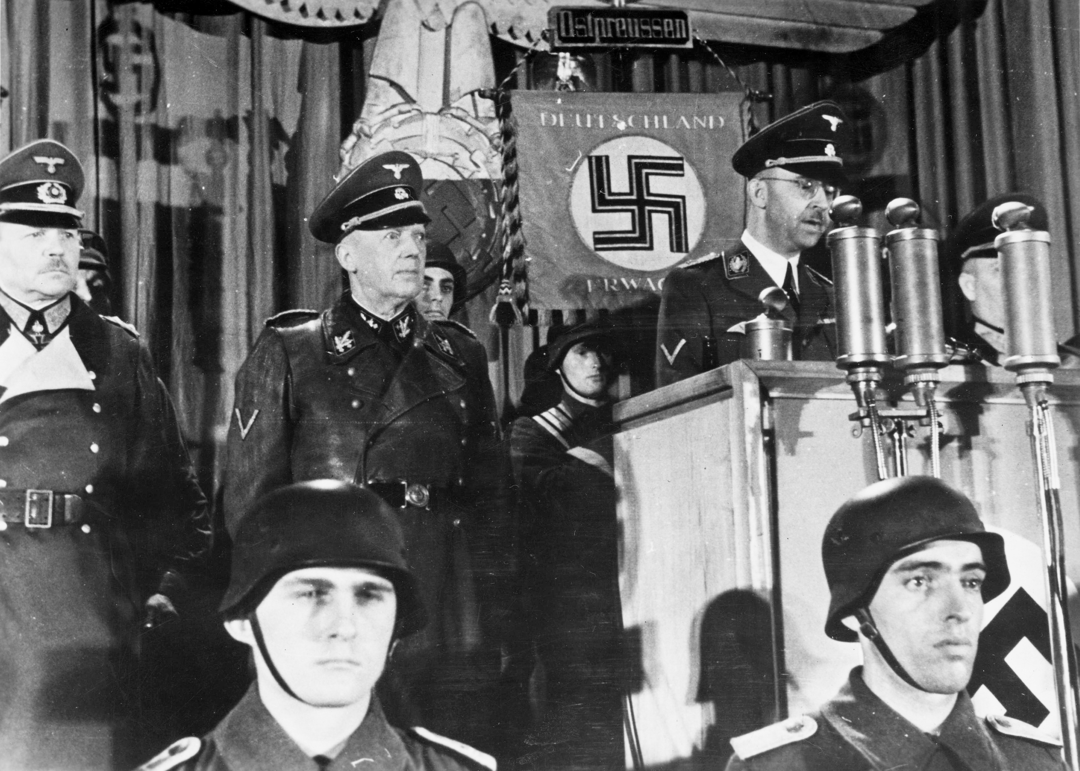 Der Volkssturm wird aufgerufen Der Reichsführer SS Himmler sprach als Befehlshaber des deutschen Ersatzheeres vor den angetretenen ostpreussischen Volkssturm-Bataillonen, die als erste zu den Waffen gegriffen haben. Neben dem Reichsführer-SS Obergruppenführer Lammers und Generaloberst Guderian. Foto: SS-PK Falkowski/Transocean-Europapress- Okt. 1944